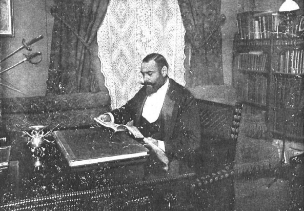 El ministro de Hacienda, Sr. Allendesalazar en su despacho particular. Fotografía de Manuel Compañy.